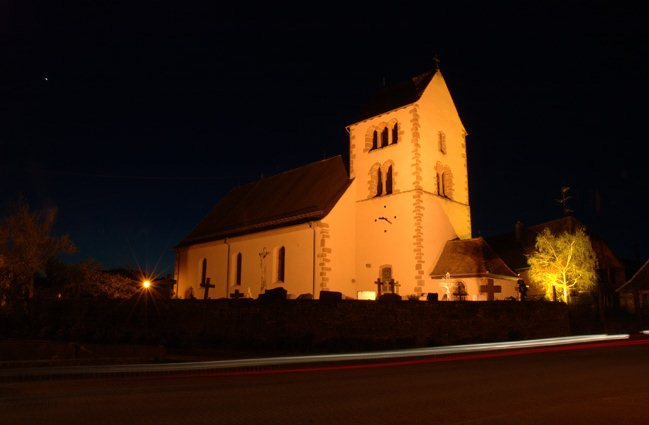 Église Saint-Nicolas de Neuve-Église, Alsace